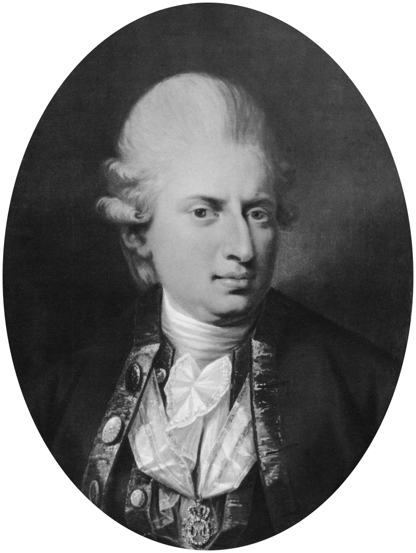 Portrait of Johann Friedrich Struensee (1737-1772)